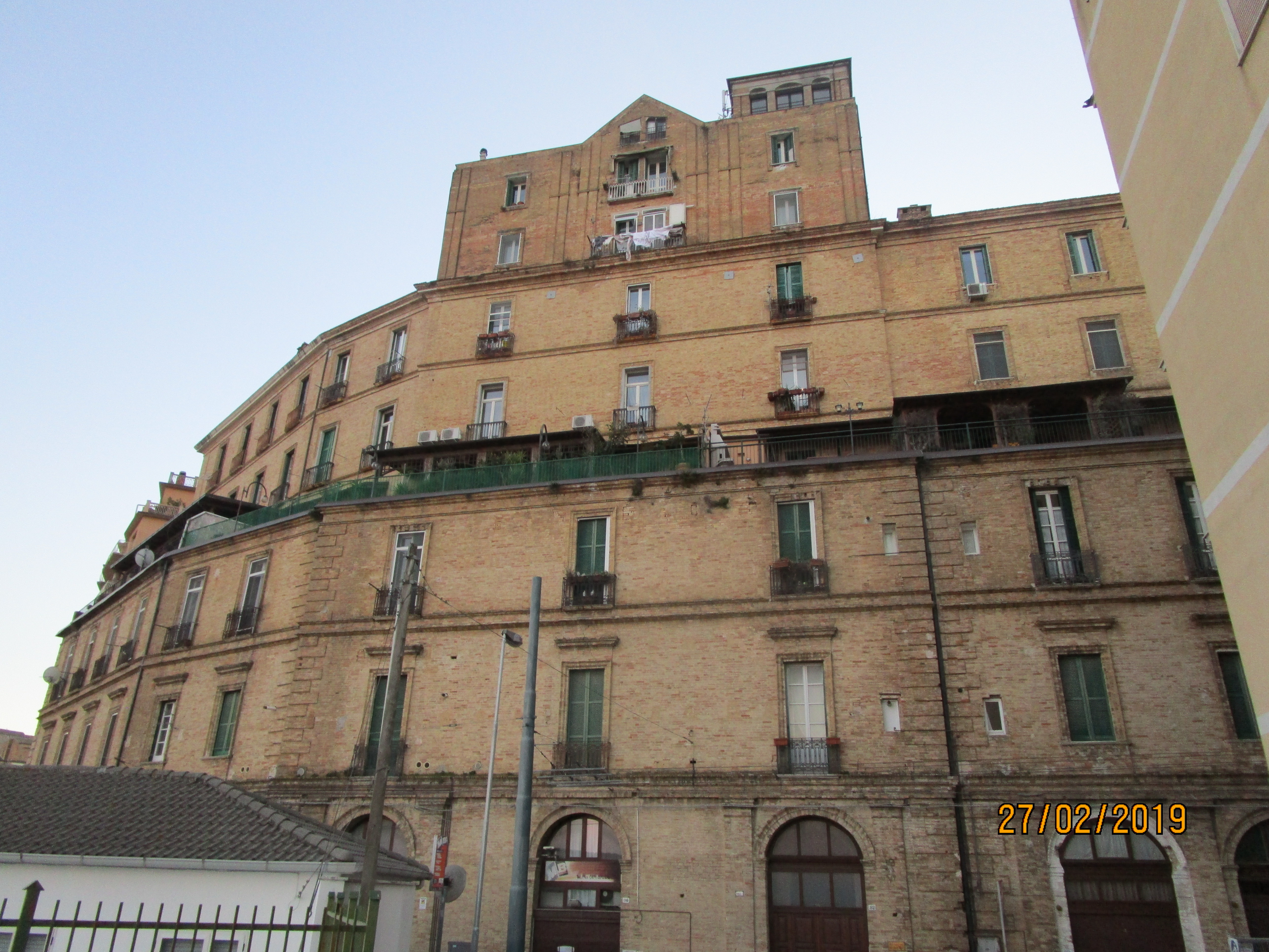 Edificio residenziale costruito dall'omonima famiglia alla fine del XIX secolo, sulle mura angioine della città di Chieti